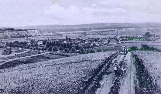 Grossgrabe/Thüringen vom Weinberg aus gesehen (1909), nach einem Bild von Otto Thomasczek, Künstler aus Mühlhausen in Thüringen.